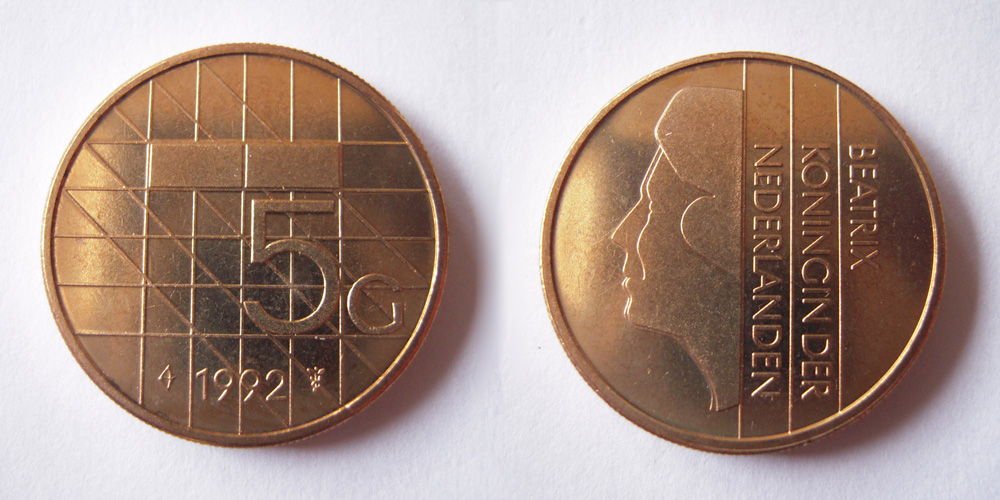 Nederland, 5 gulden, nikkel met bronscoating, geslagen te Utrecht, 1992.